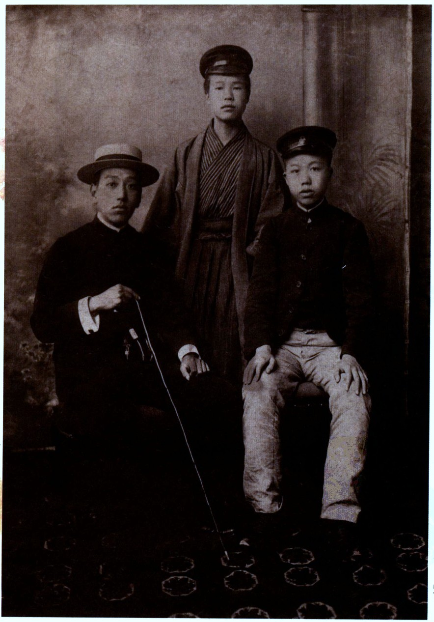 右為宣統二年工科進士黃曾銘